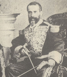 Foto del General de División Leonardo Márquez Araujo (1820-1913)